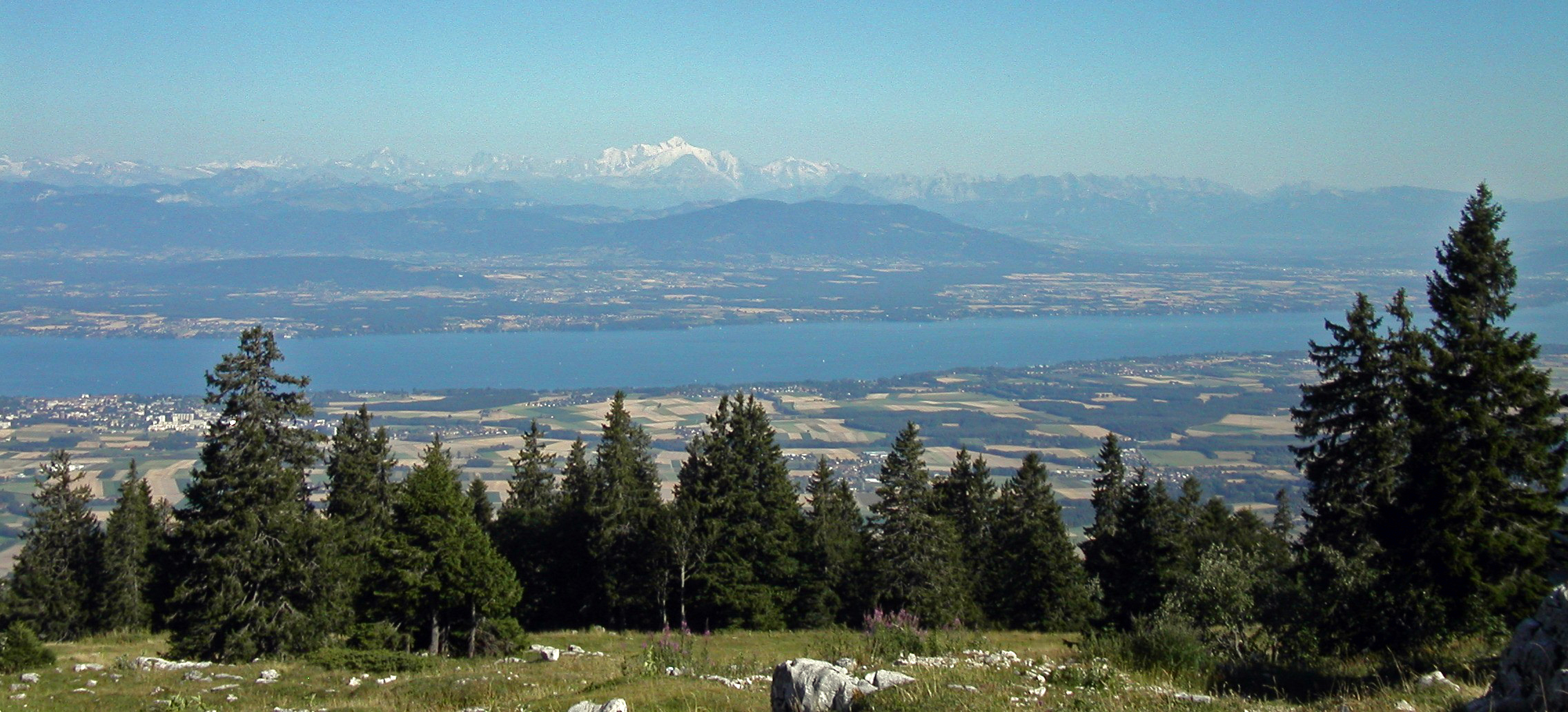 Le Léman, les Alpes de Haute-Savoie et le Mont Blanc, vus de La Barillette ; auteur : utilisateur:Marc Mongenet ; date : juillet fr:2003 ; licence